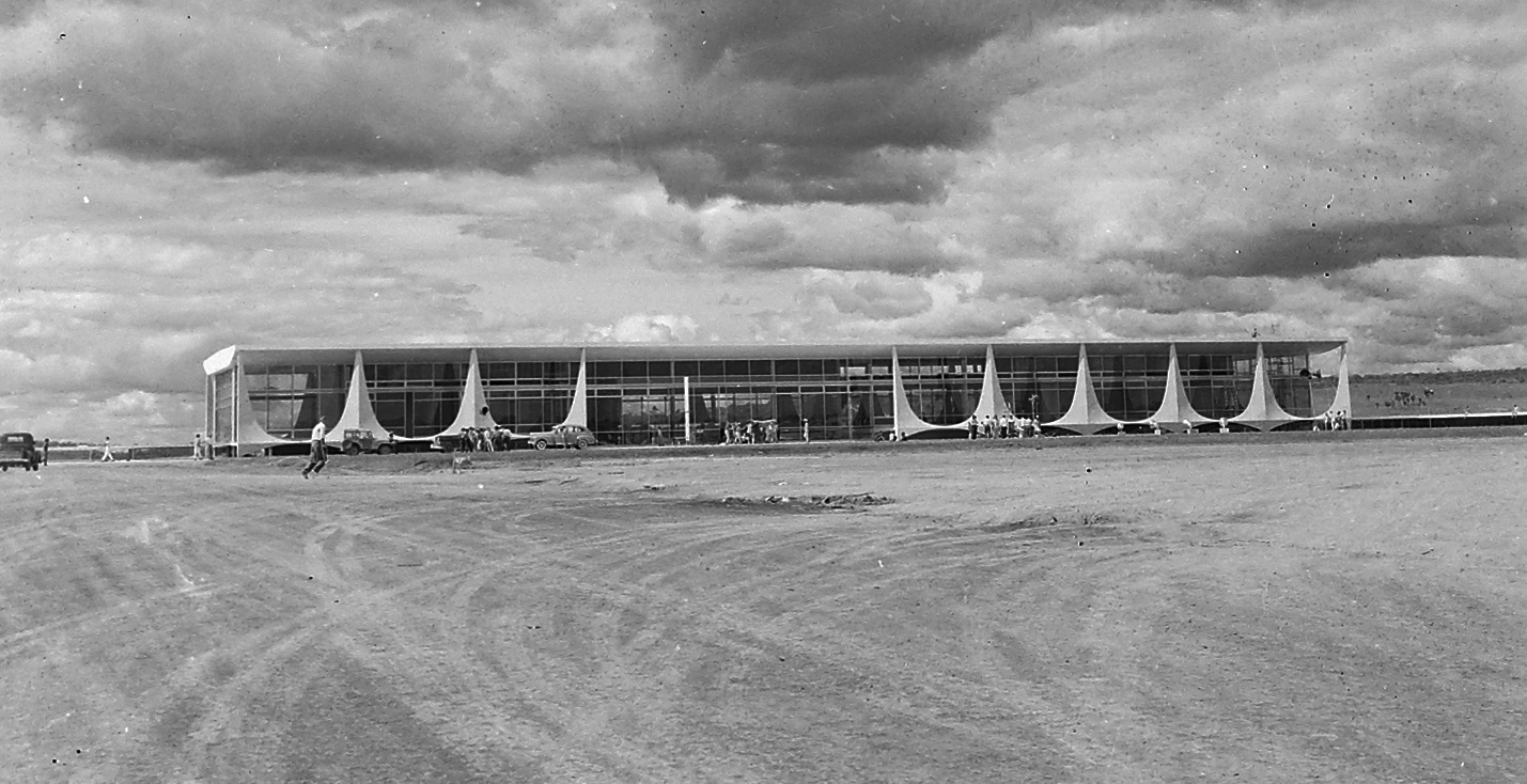 Imagem do Fundo Agência Nacional, do Arquivo Nacional